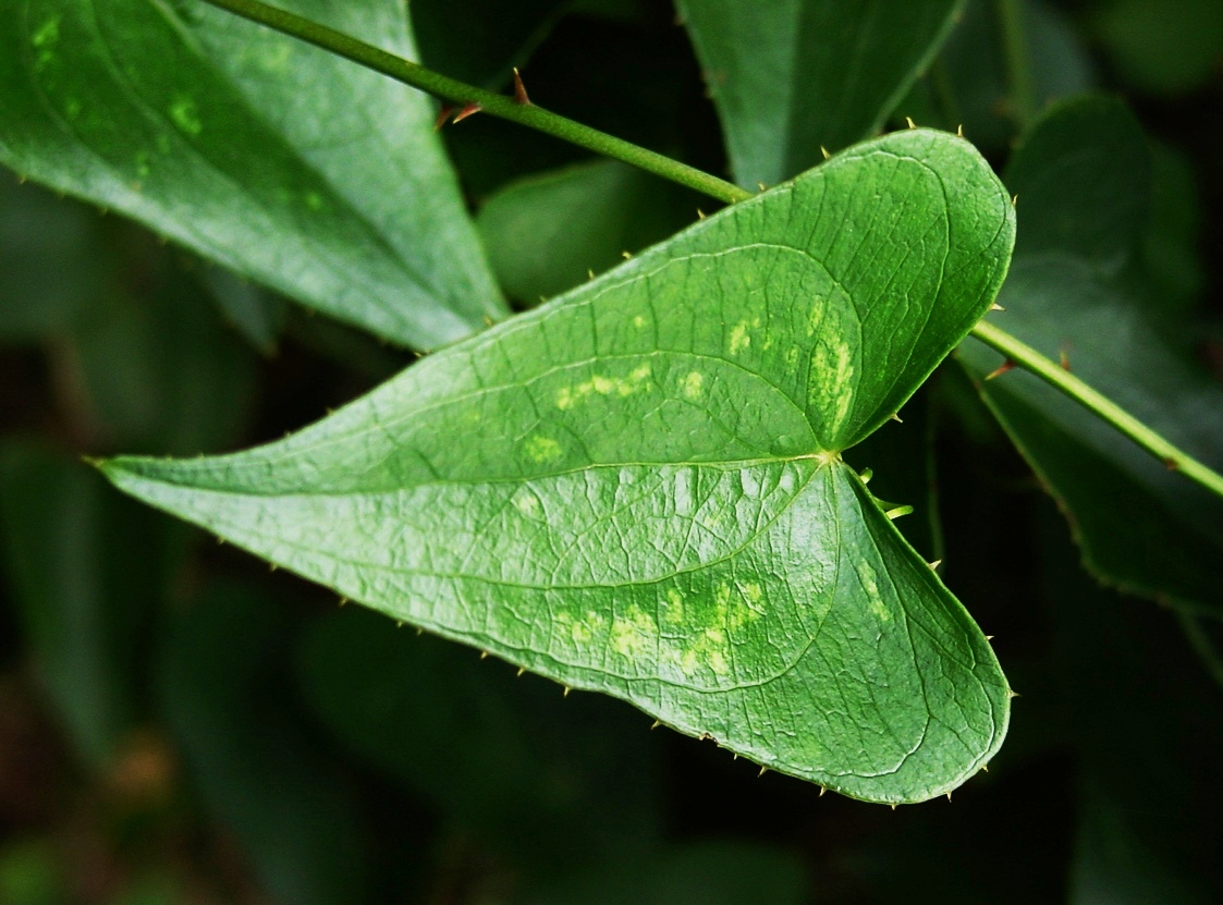 Smilax aspera Riserva naturale Monte Pellegrino Palermo, Sicily